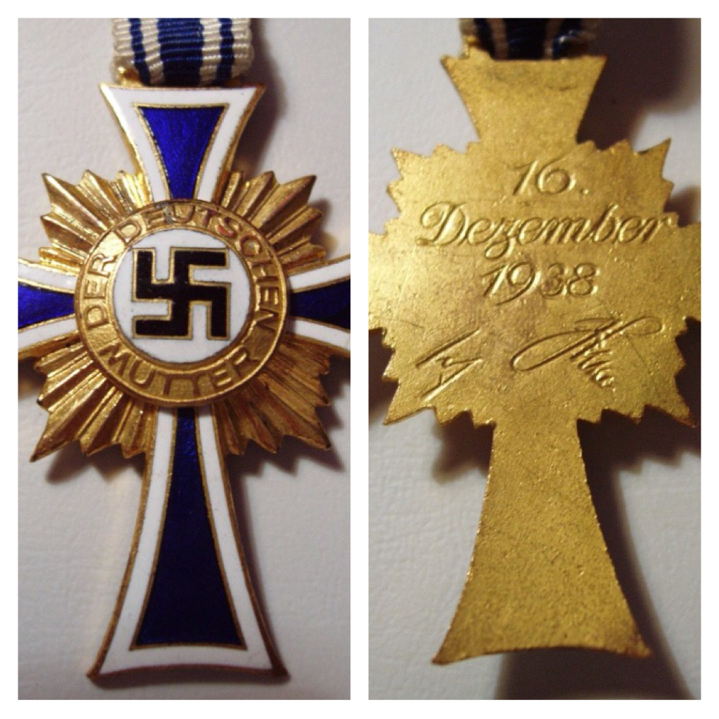 A la izquierda se muestra la parte frontal de la Cruz y a la derecha el dorso